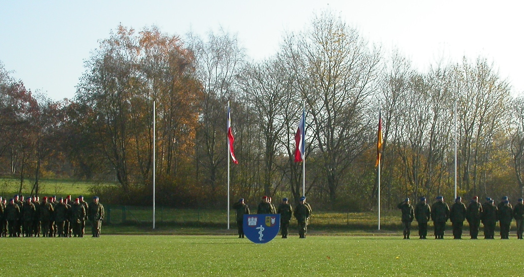 Militärischer Appell zur Kommandoübergabe des Lazarettregiments 71 (na) am 7. November 2003 in Breitenburg, Kreis Steinburg. Generalarzt Dr. Arno Roßlau übergibt das Kommando von Oberstarzt d. R. Prof. Dr. Jörg Haasters an Flottenarzt d. R. Prof. Dr. Rüdiger Döhler.